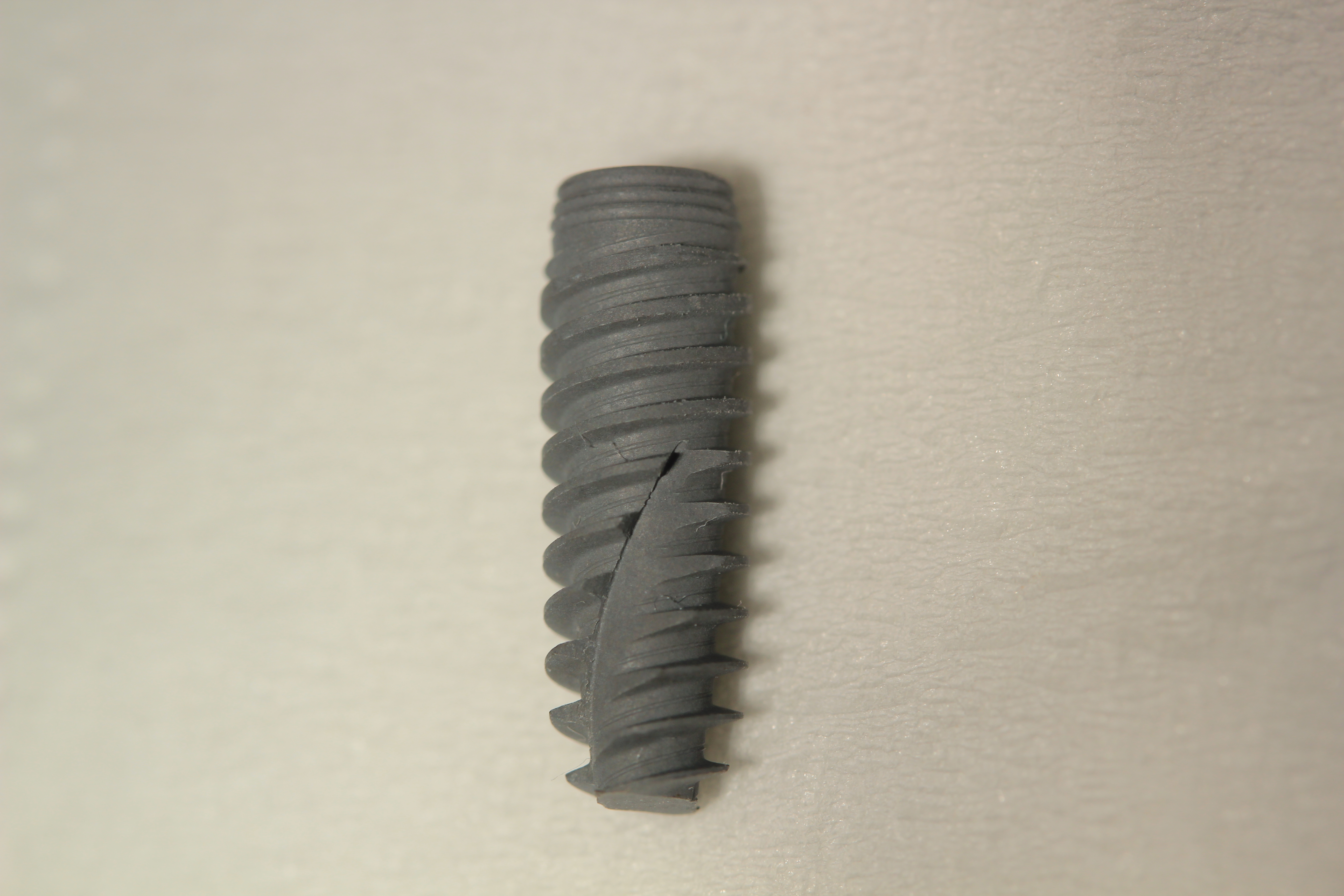 implant" Nobel Active" WP de 13mm de long